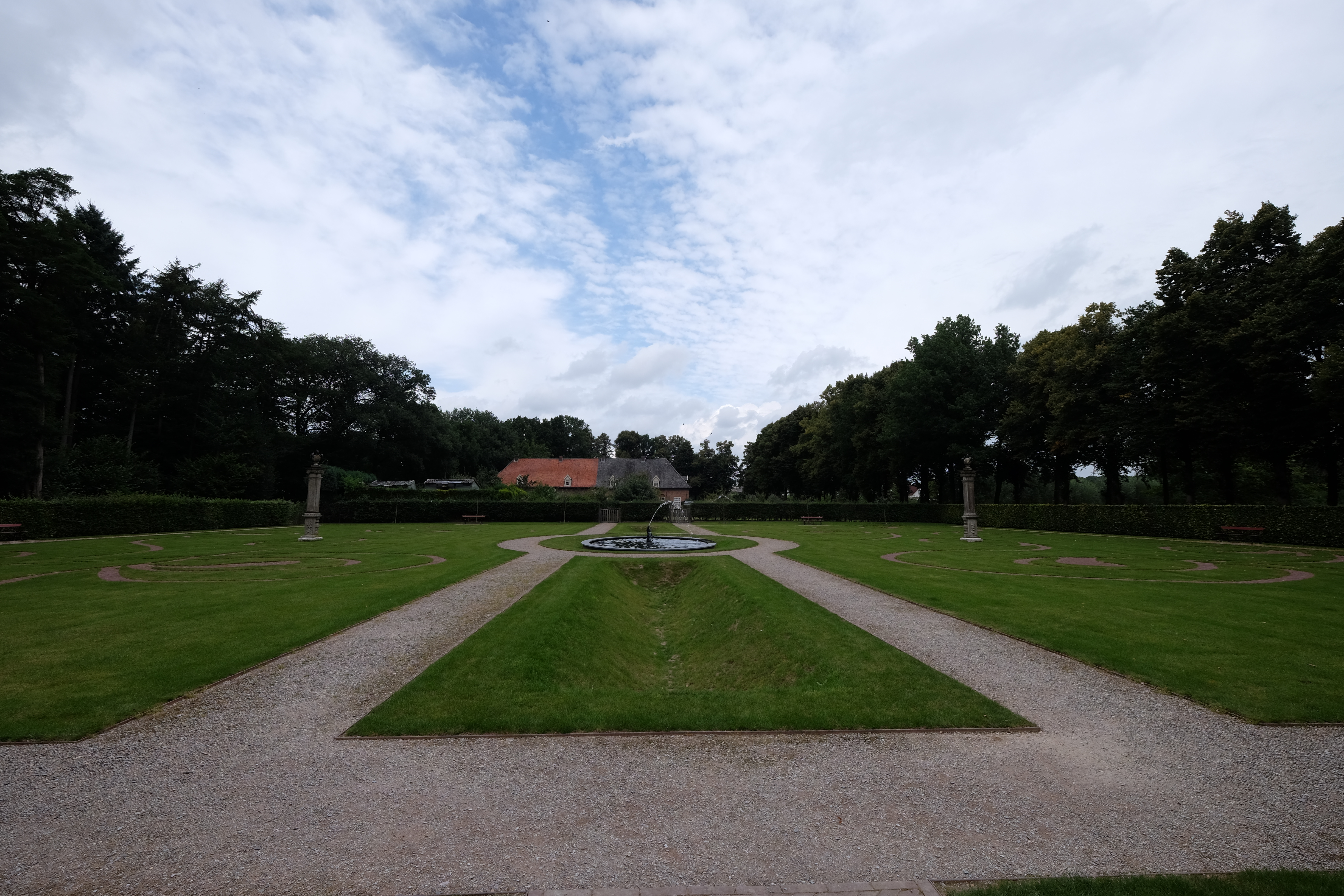 7041 's-Heerenberg, Netherlands